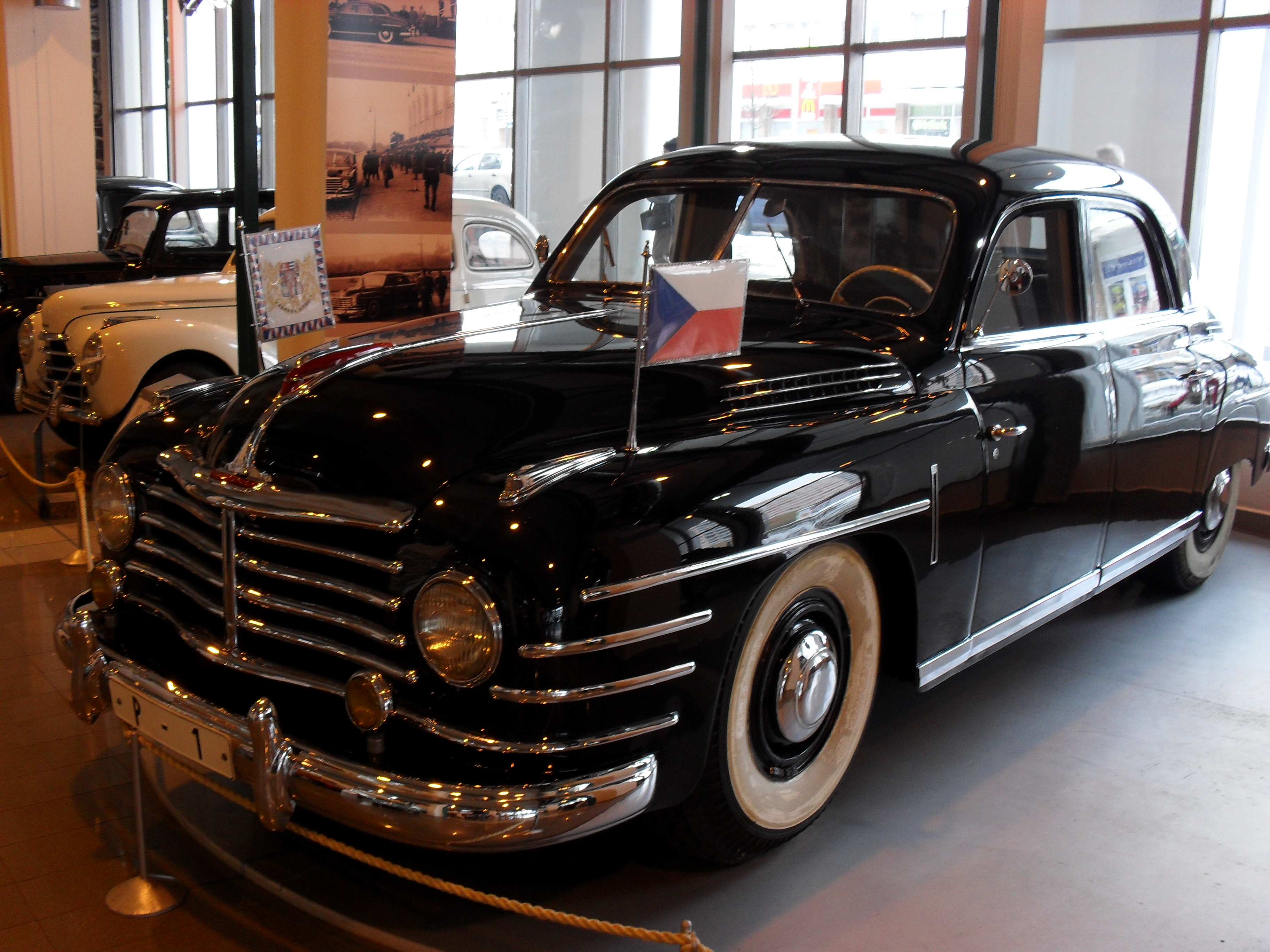 Limuzína z automobilky Škoda, vyrobená na zakázku, speciálně pro pořeby prezidenta Gottwalda